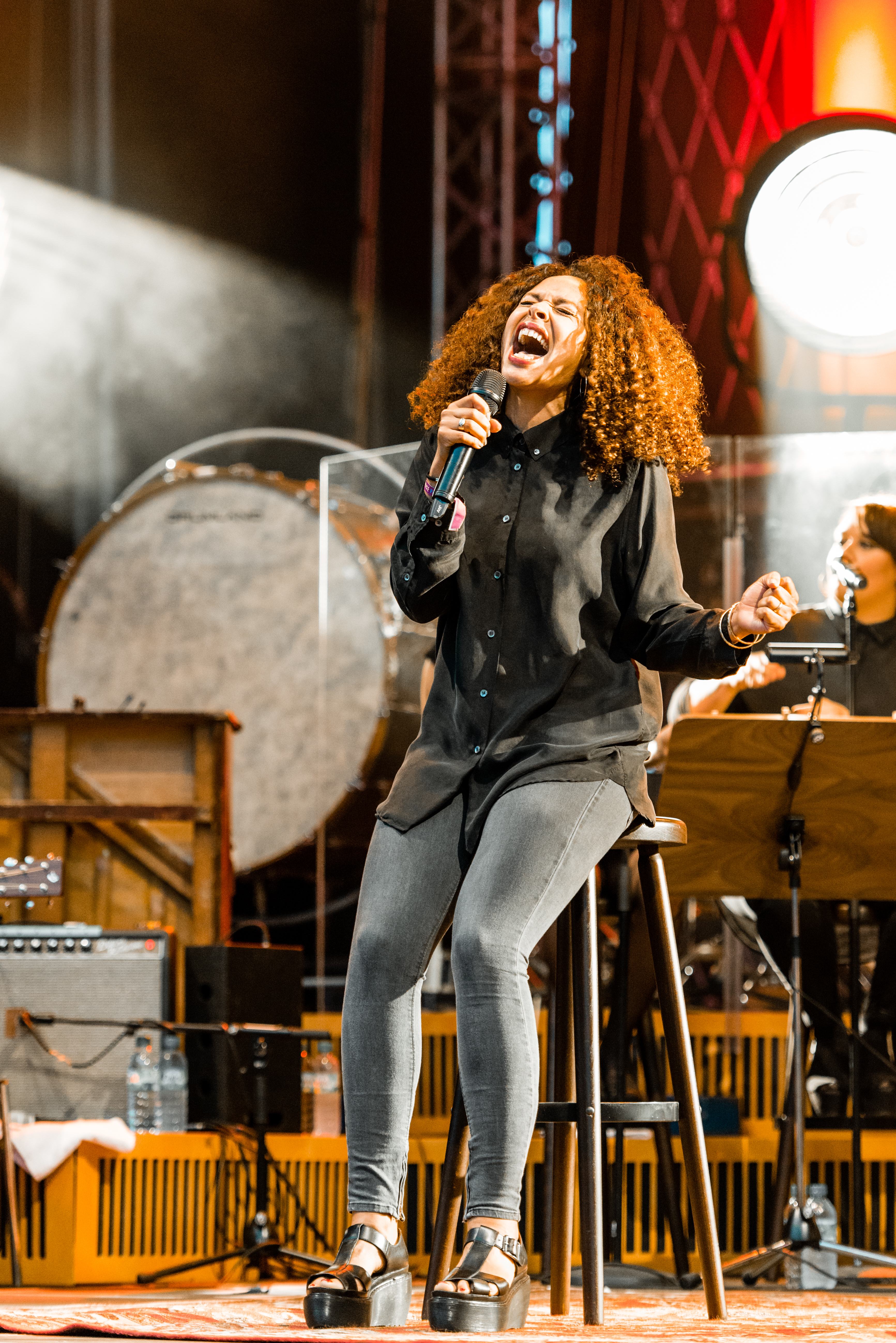 'Open Source Festival 2014 - Düsseldorf': 'Max Herre & Kahedi Radio Orchestra MTV Unplugged feat Joy Denalane, Afrob, Megaloh...'